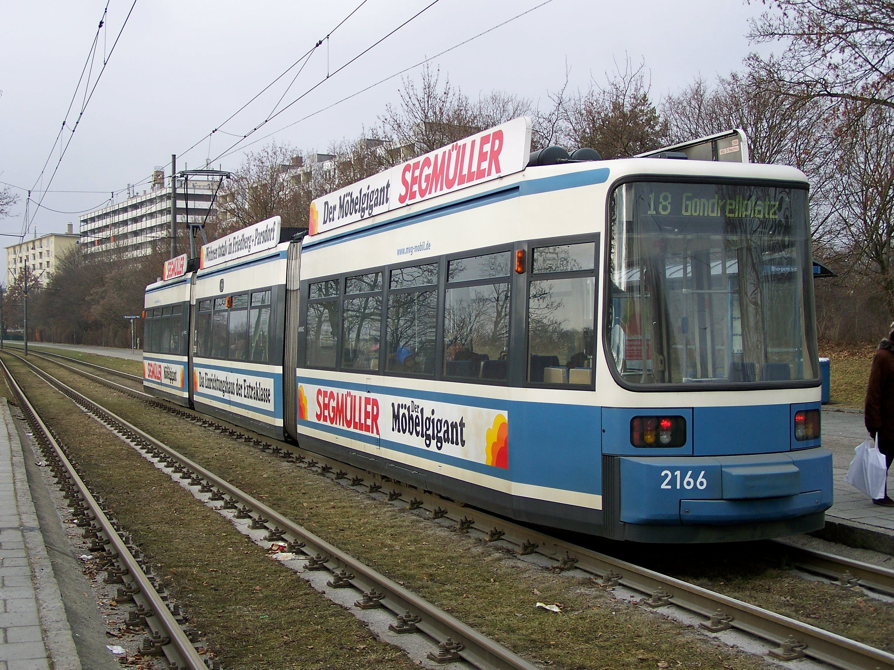 Straßenbahn München, Linie 18 Richtung Gondrellplatz an der Haltestelle "Stegener Weg"